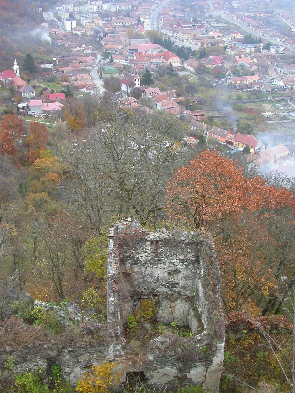 Ansamblul "Str. Cetății" sec. XVIII - XIX